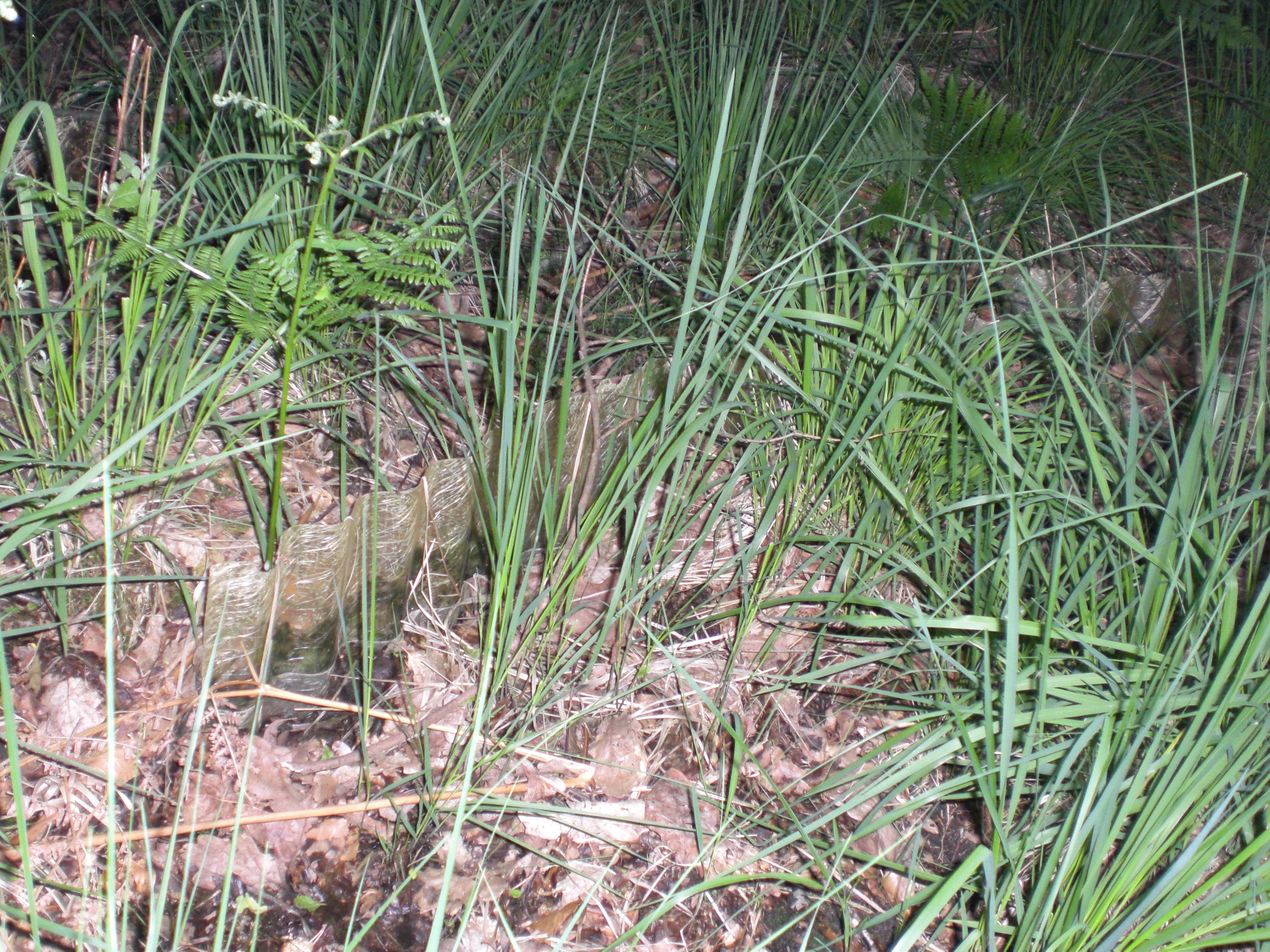 Plastikzaun im Jägersburger Moor als Versuch, das Wasser im Moor zu halten.